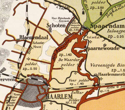 Waarderpolder